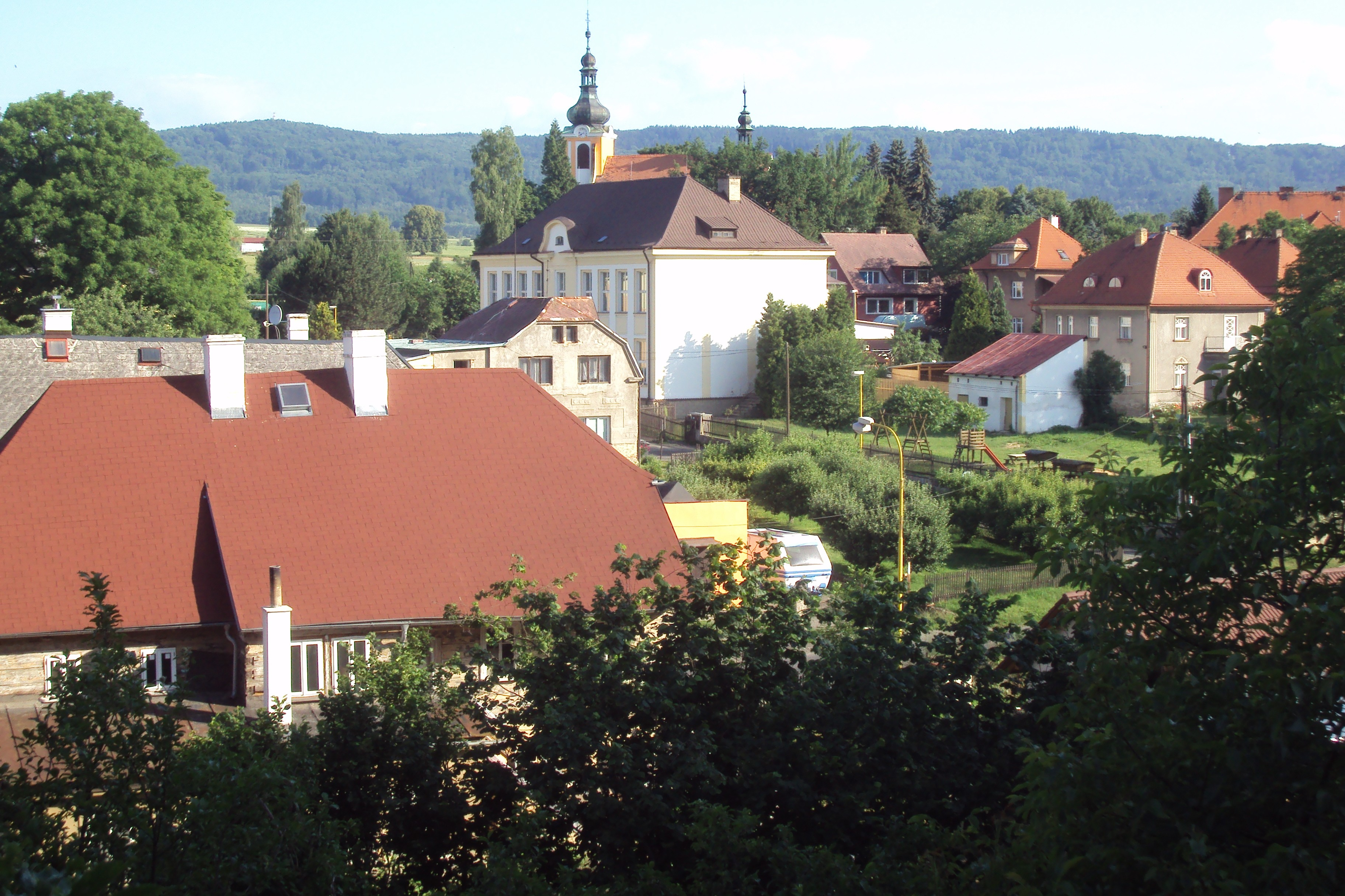 Skalice z úpatí Skalického vrchu